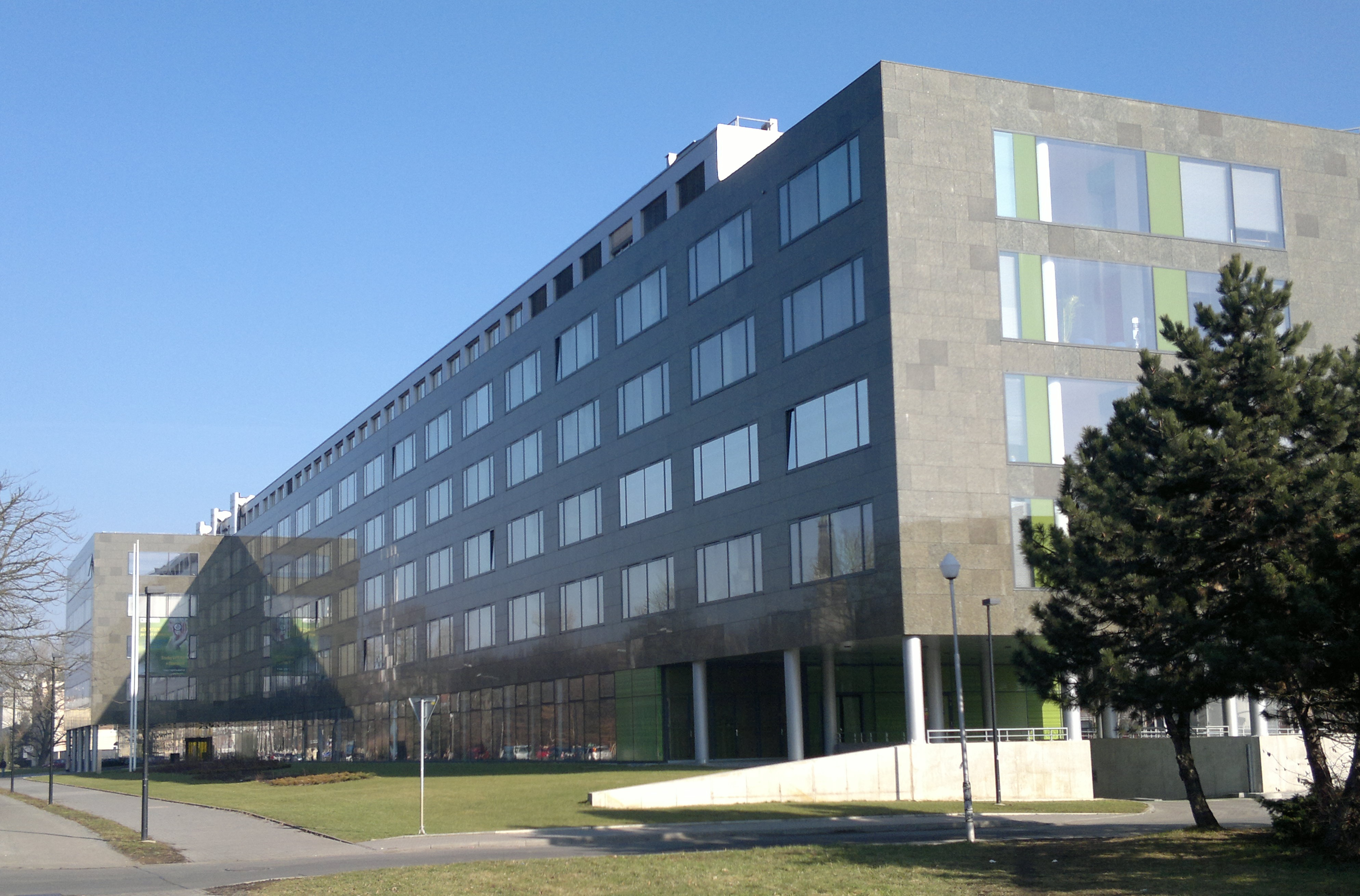 Nová budova Přírodovědecké fakulty UP Olomouc